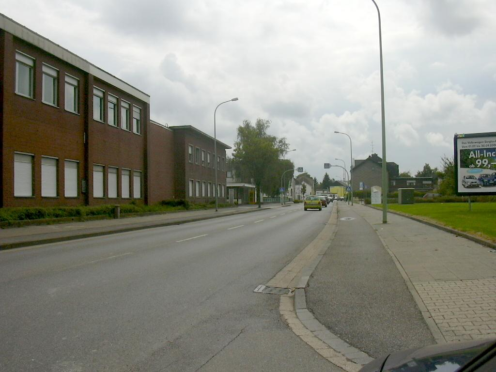 Krauthausen (Düren), Ortsdurchfahrt mit Fa. Sihl own work papa1234 2006-08-12